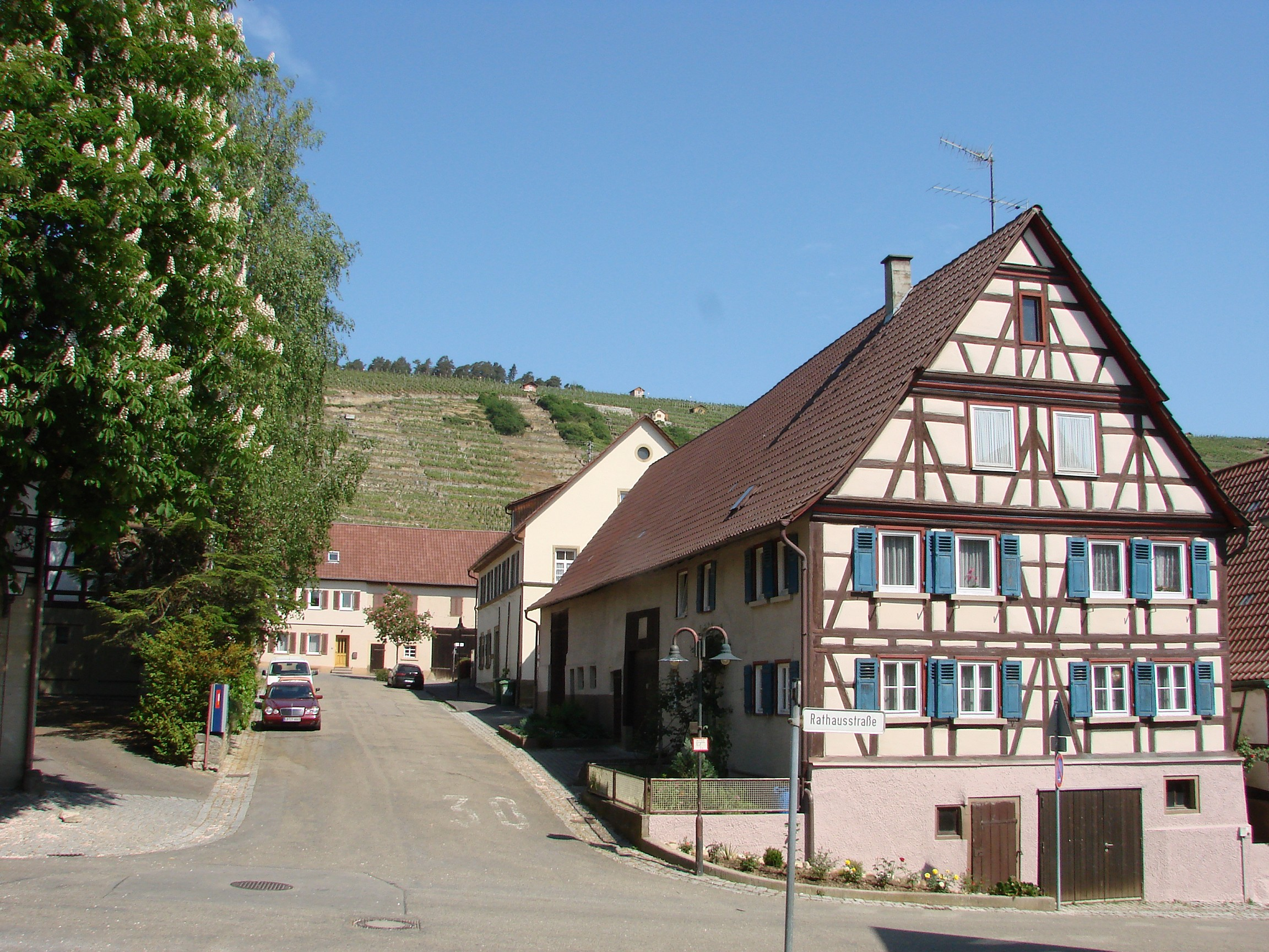 Roßwag, Germany. Kreuzung Adlerstraße/Sankt-Martin-Straße/Rathausstraße/Mühlhäuser Straße